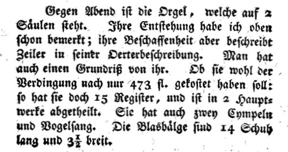 Beschreibung der Ehmann-Orgel (1640), Dreifaltigkeitskirche Ulm